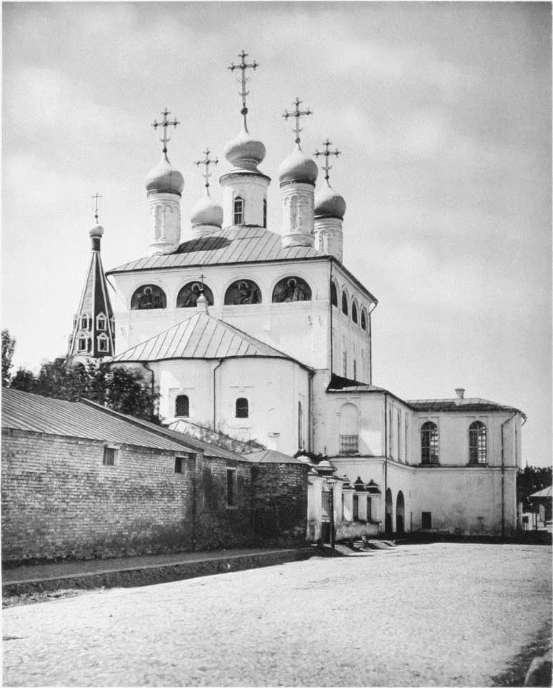 Крутицкое Патриаршее подворье (Собор Успения Пресвятой Богородицы)